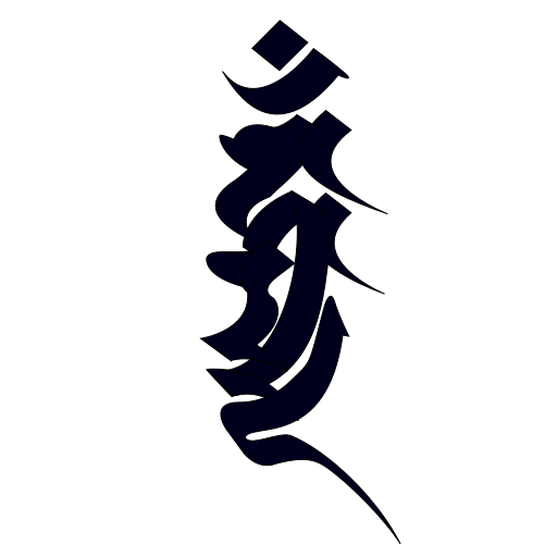 梵字hāṃmmāṃカーンマーン 不動明王の種子字